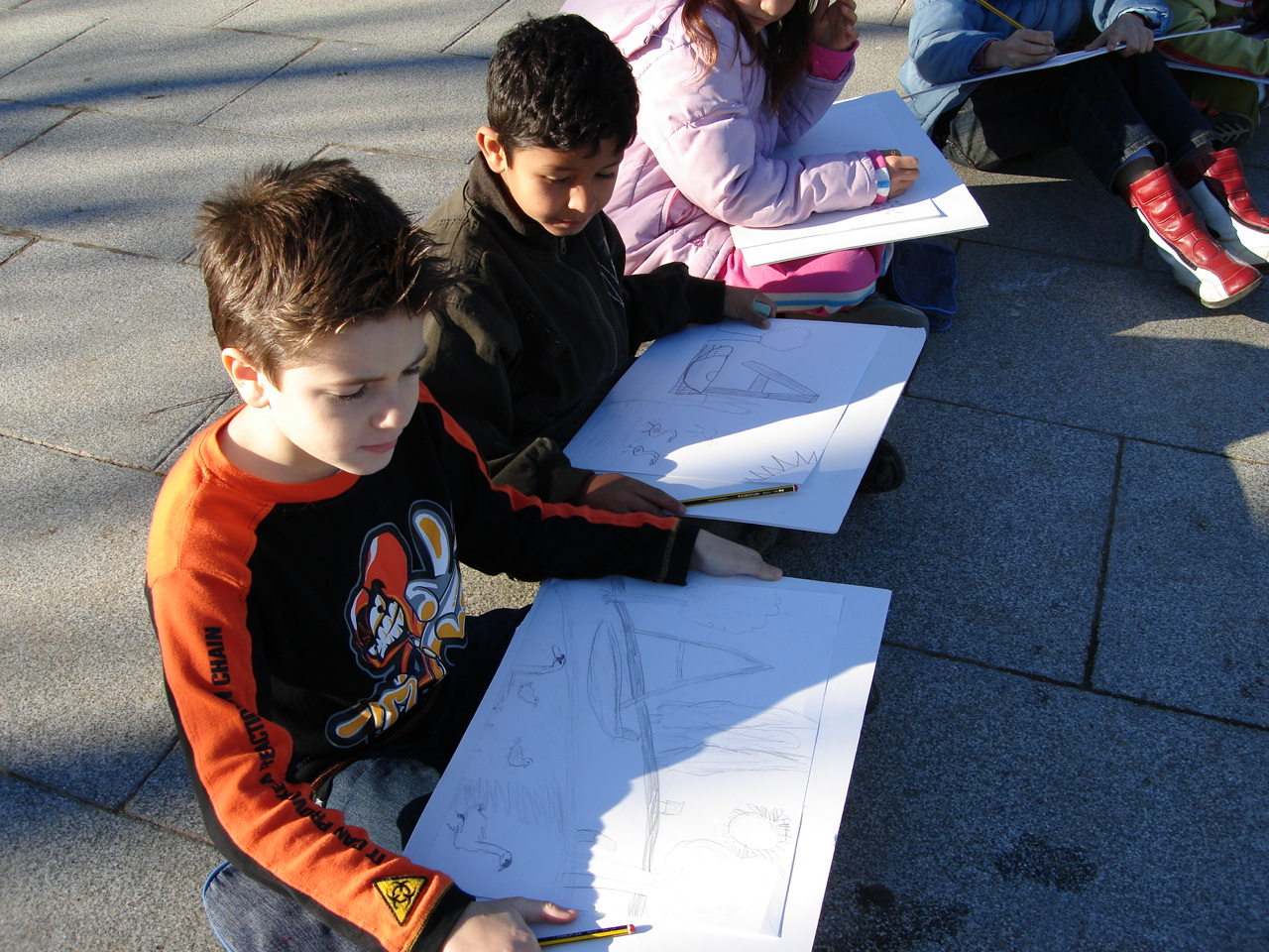 Dibuixos realitzats pels alumnes al Parc de Catalunya de Sabadell